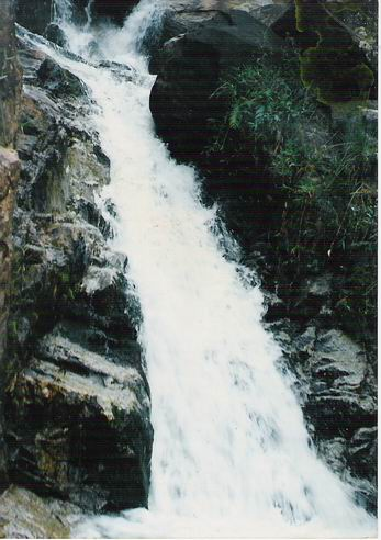 punto Mundo Malo, municipio de Bello